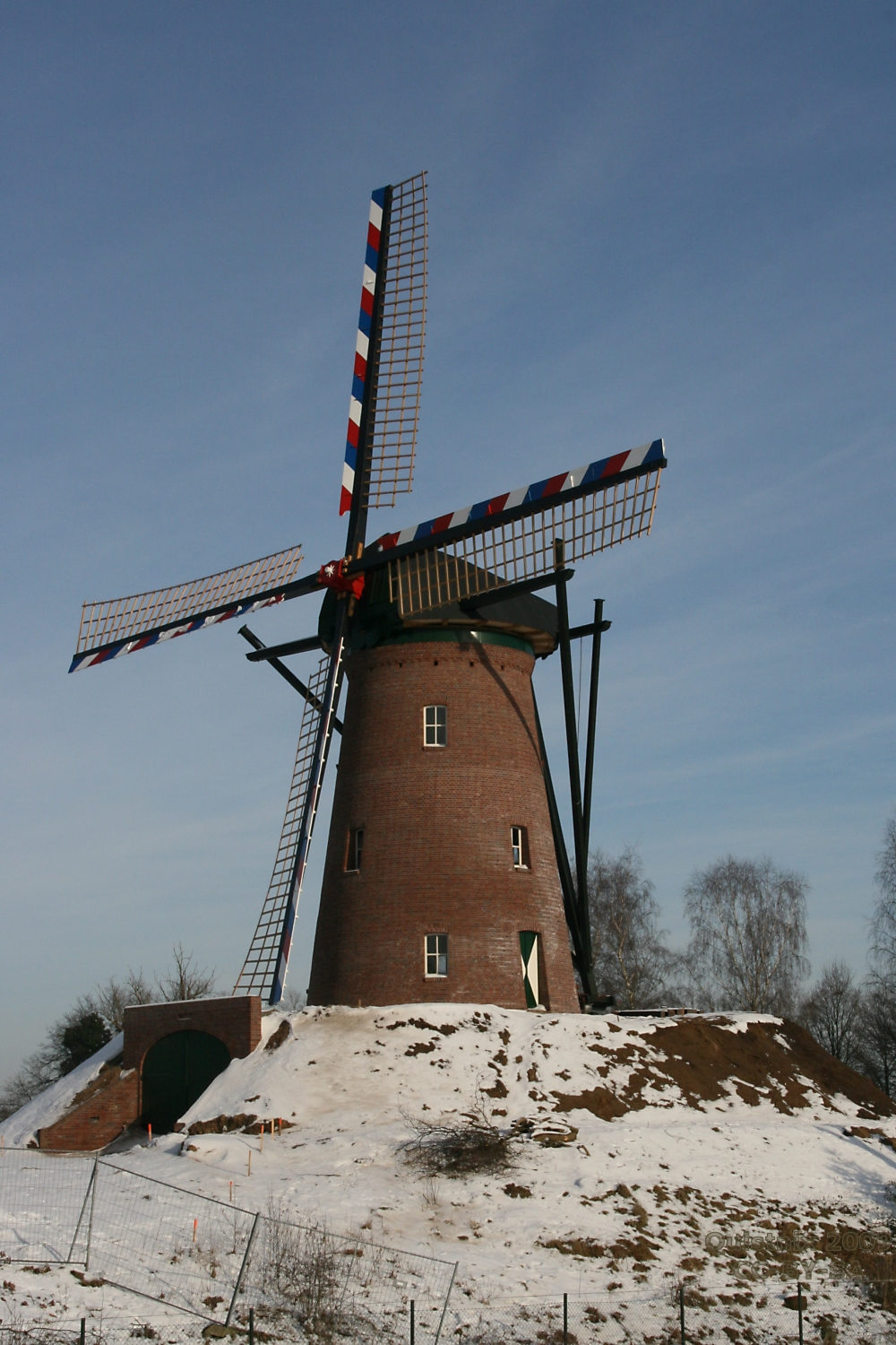 Lottum: Houthuizer Molen in de sneeuw